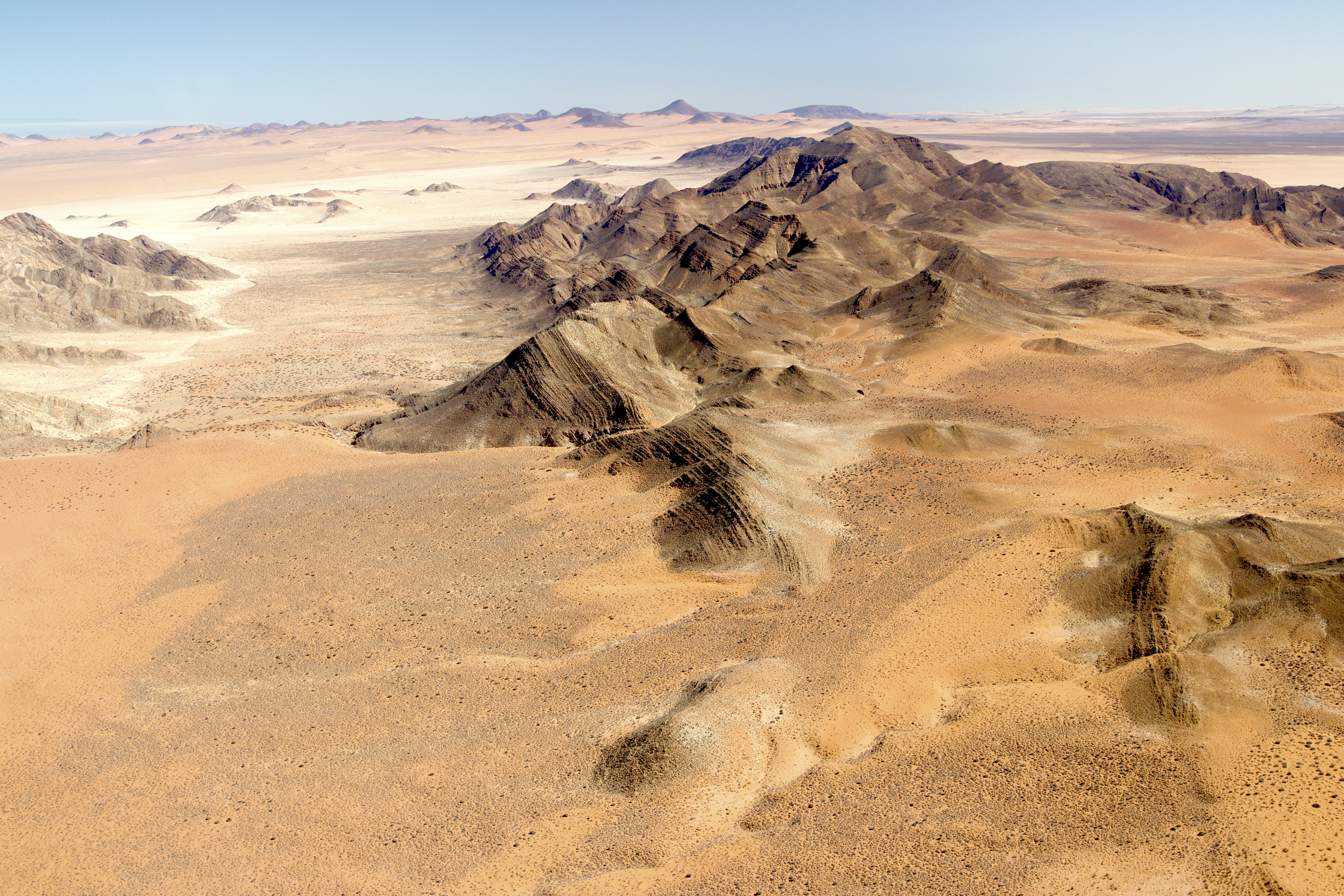 Heioab aerial view 2018